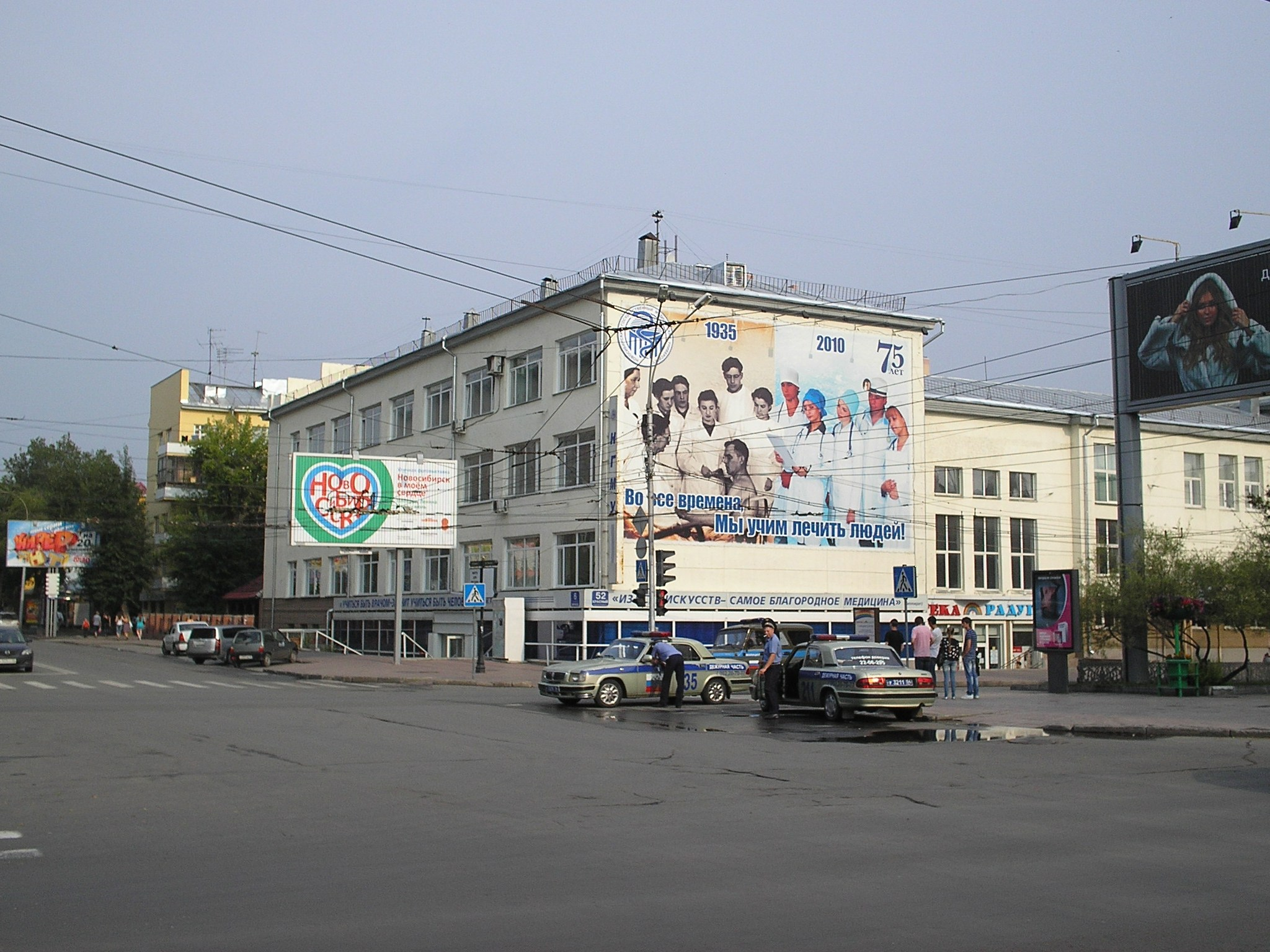 Здание Новосибирского государственного медицинского университета (Новосибирск, Красный проспект, 52 / ул. Фрунзе, 6)